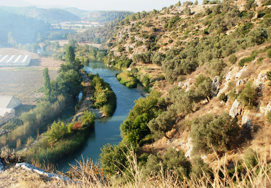 Der antike Fluss Xanthos von der gleichnamigen antiken Stadt gesehen